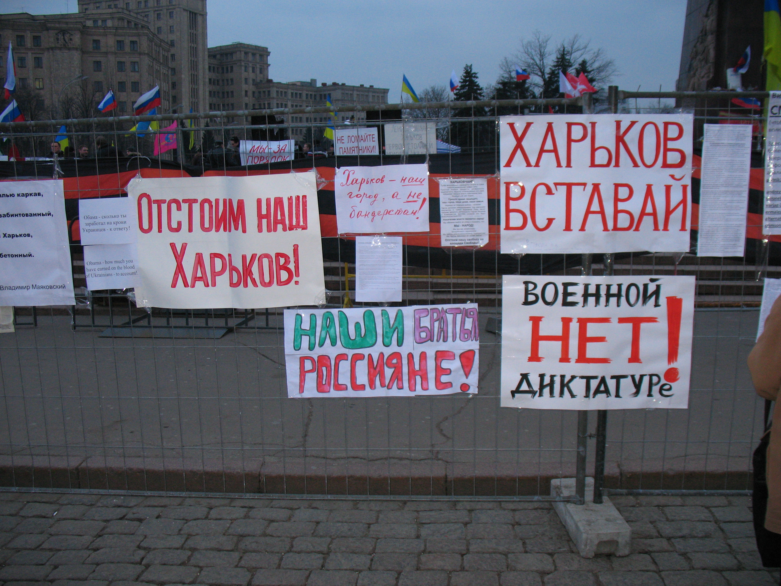 Харьков, 1 марта. Защита памятника Ленину горожанами от боевиков "Правого сектора", которые пытаются его снести. "Отстоим наш Харьков!"